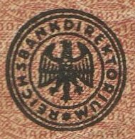 Gedrucktes Siegel der Reichsbankdirektion von 1922.